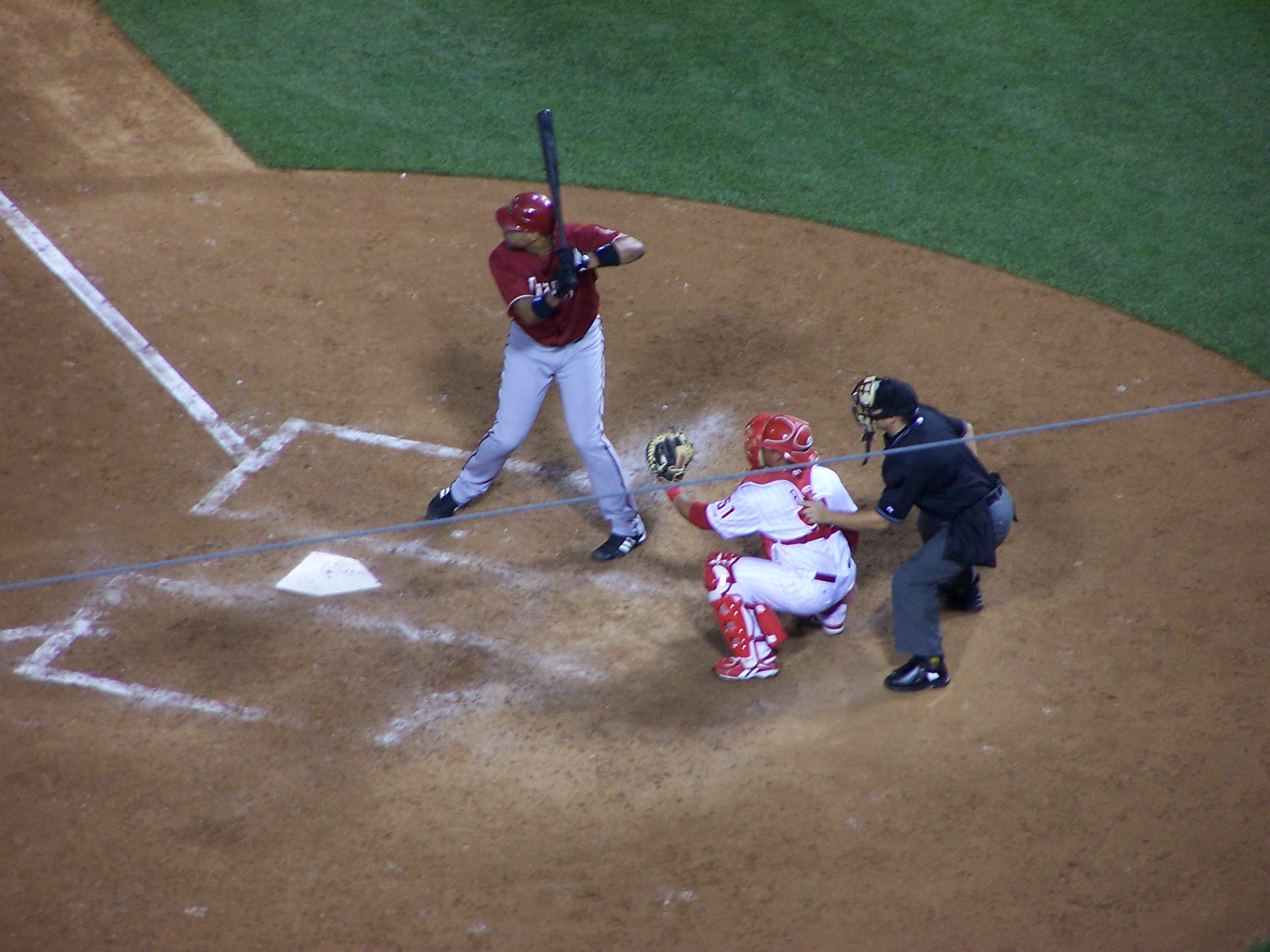 Still alive